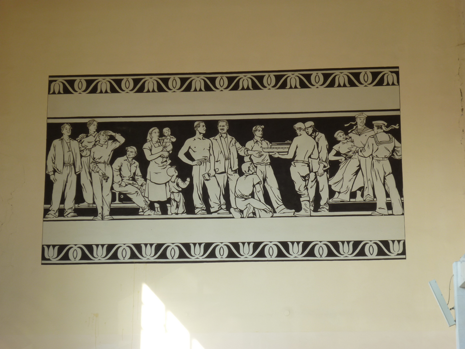 Komárno - železniční stanice